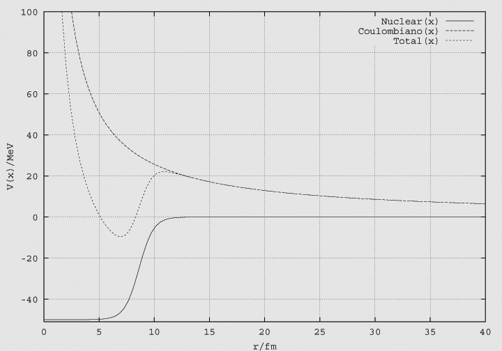 Potencial sufrido por una particula alfa